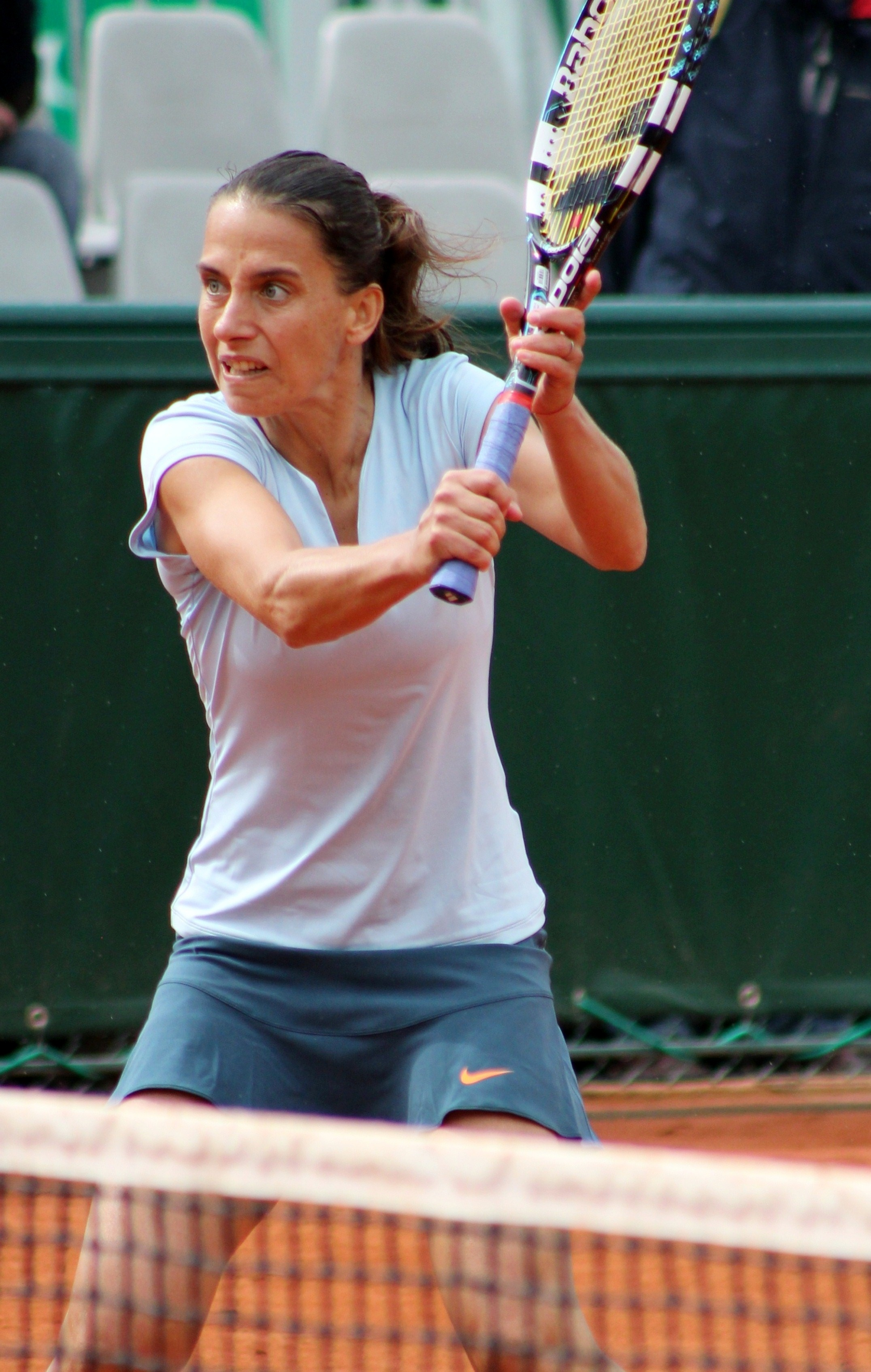 Janette Husárová